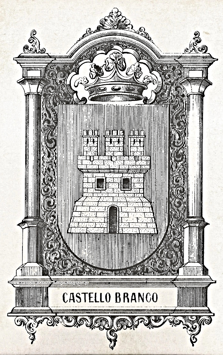 Armas da Cidade de Castelo Branco em 1860. in Barbosa, Inácio de Vilhena: As cidades e villas da Monarchia Portugueza que teem brasão d’armas